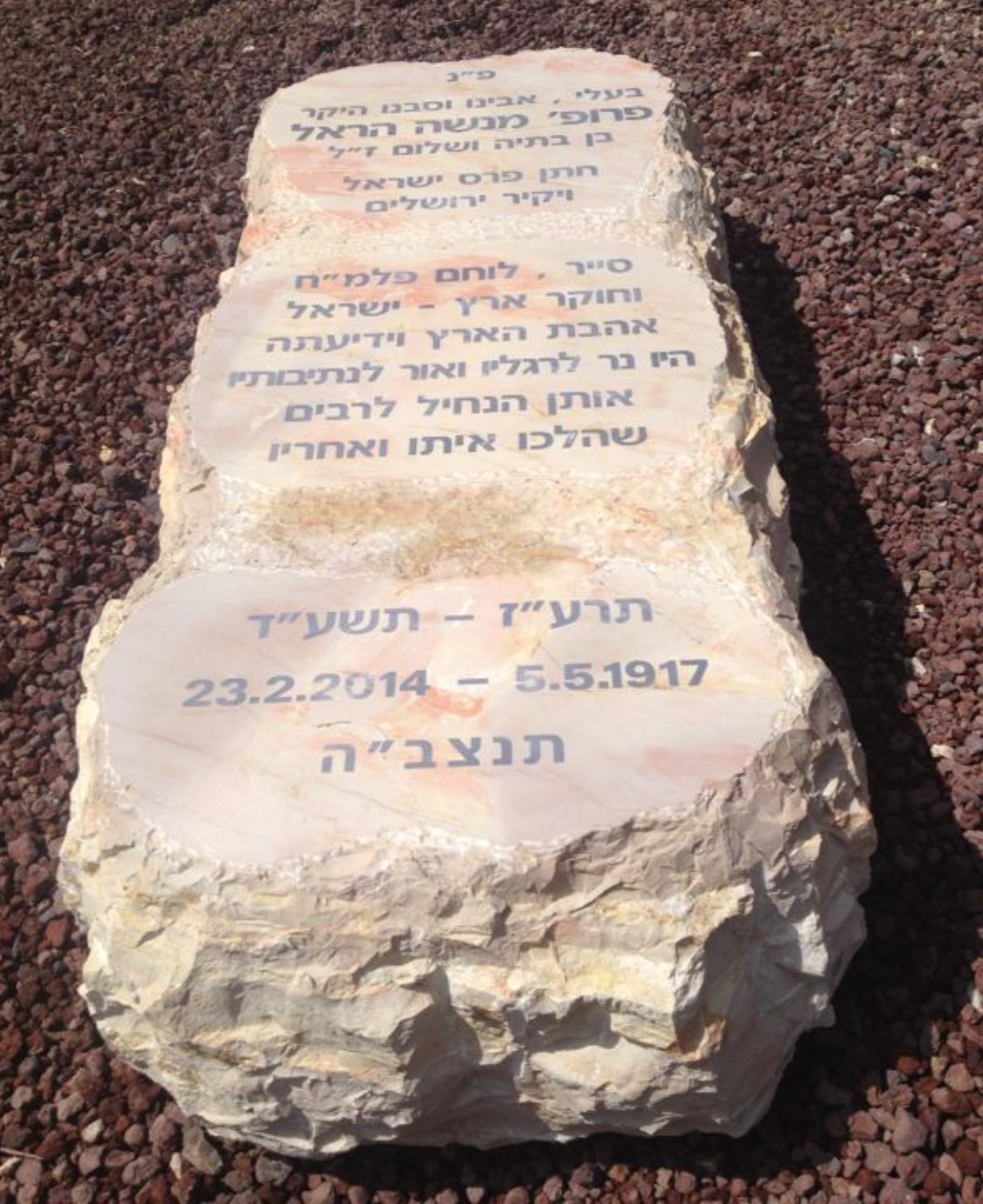 המצבה שעל קברו של פרופ׳ מנשה הראל בחלקת יקירי העיר ירושלים, בהר המנוחות